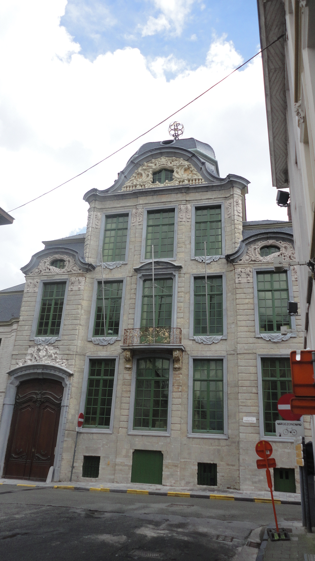 Het Huis van Oombergen aan de Koningsstraat in Gent werd onlangs gerestaureerd. Het herbergt nog steeds de De Koninklijke Academie voor Nederlandse Taal- en Letterkunde.